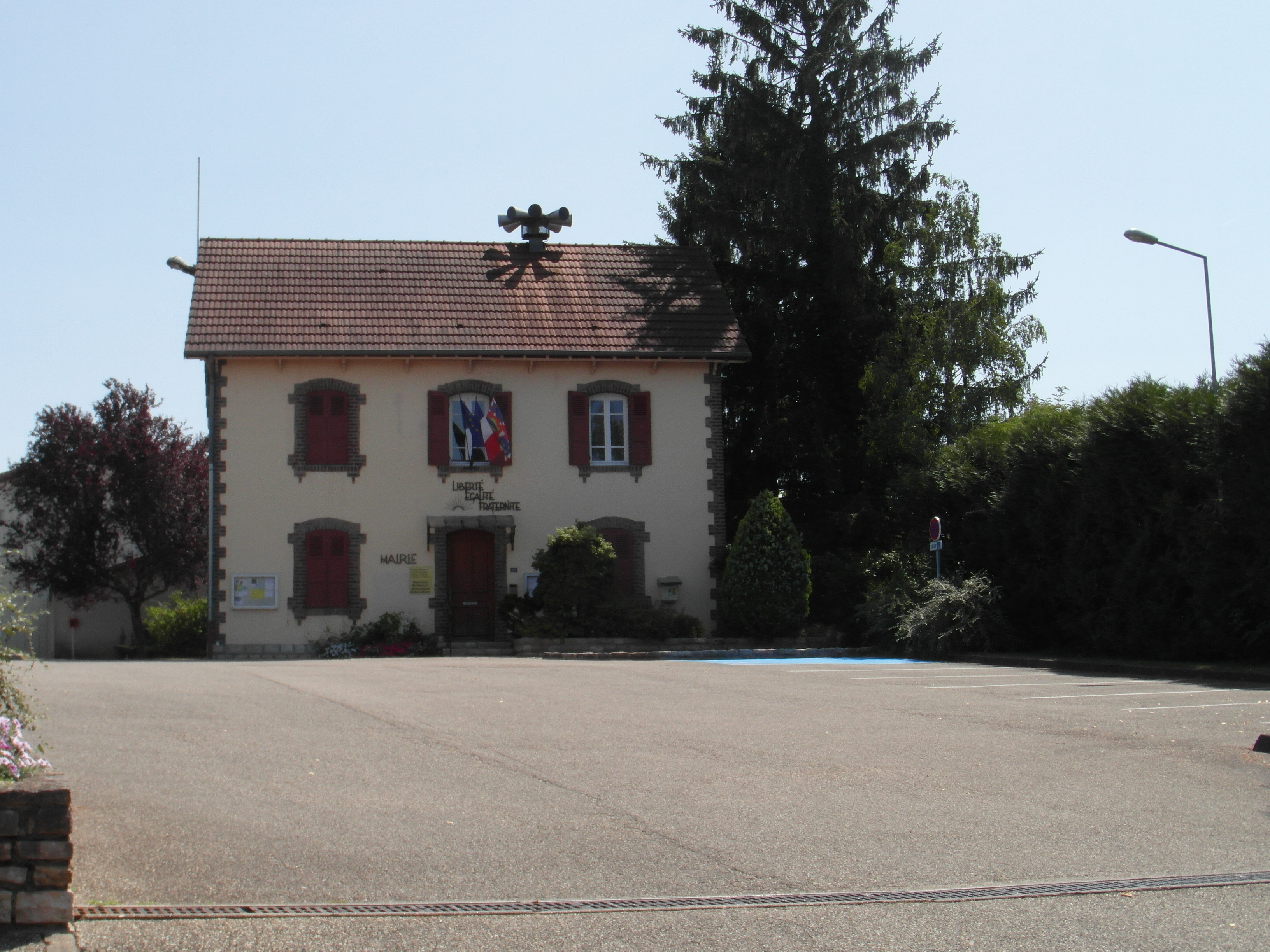 ancienne mairie de Chateaurenaud